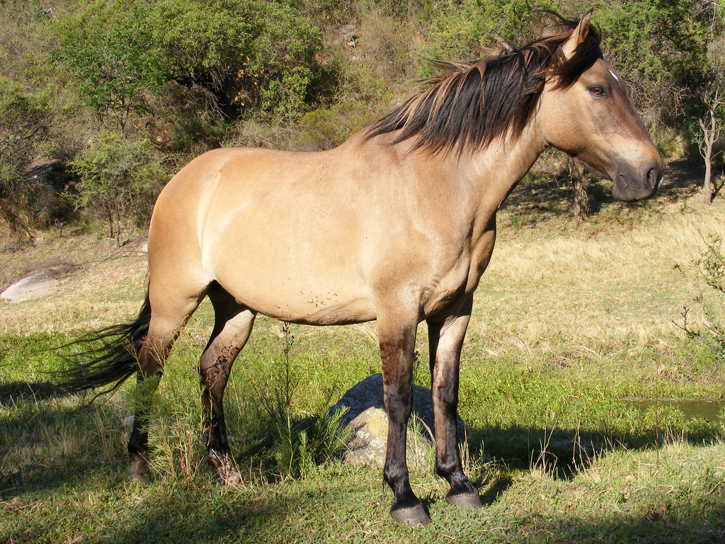 Hair